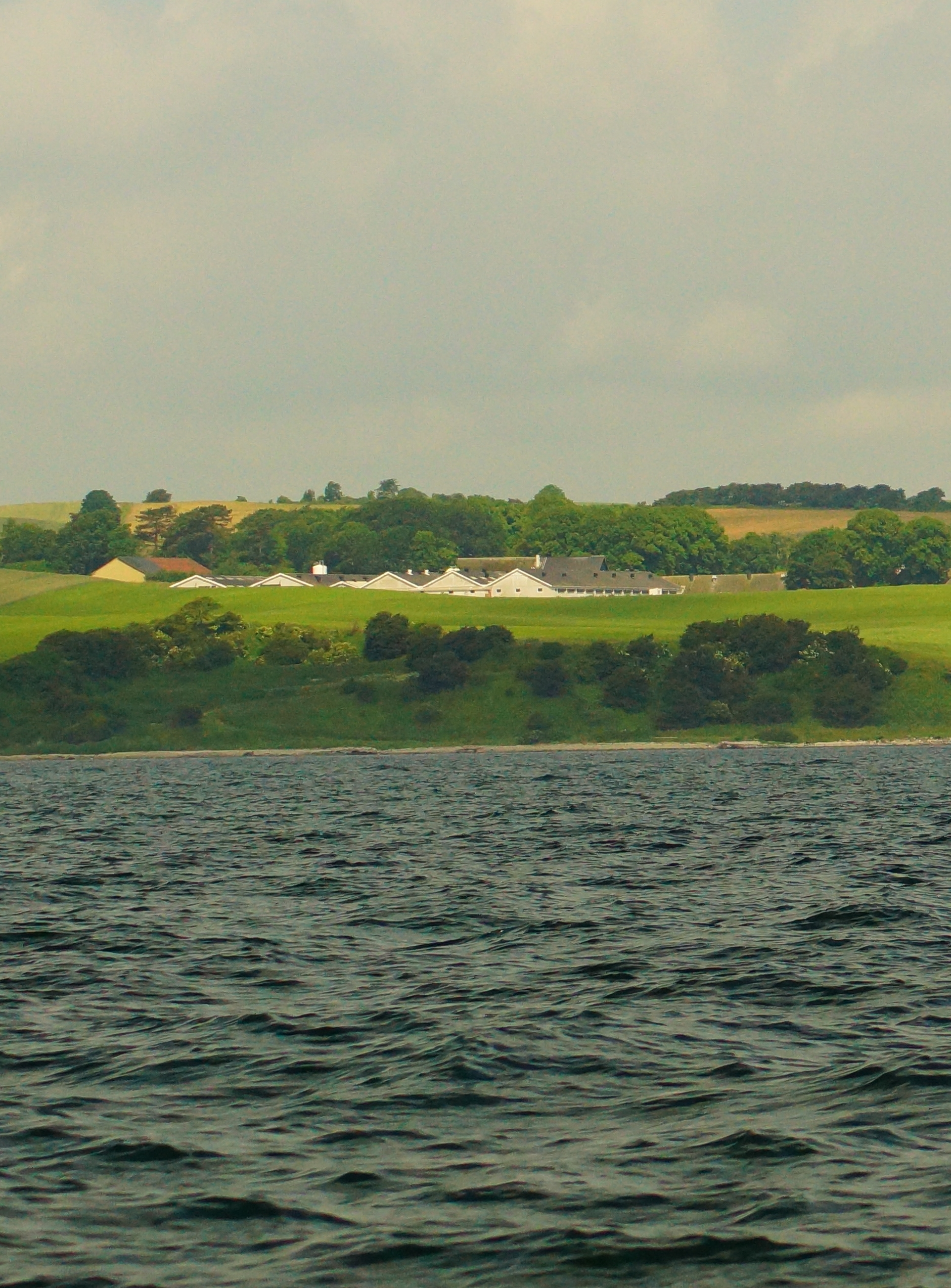 Isgård set fra havet